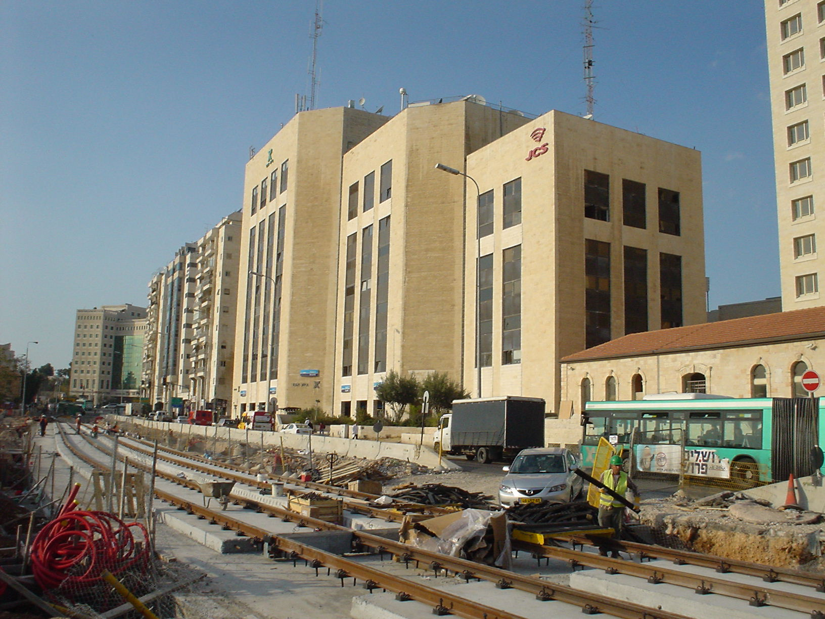 בית הזקנים הספרדי רחוב יפו ירושלים, מבט לכוון מערב